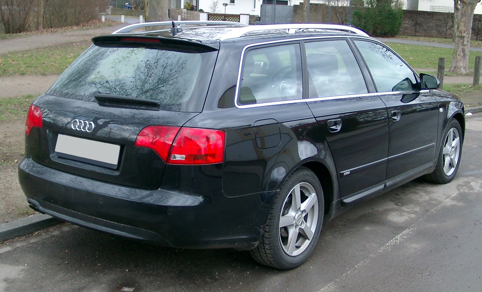 Audi A4 B7 Avant